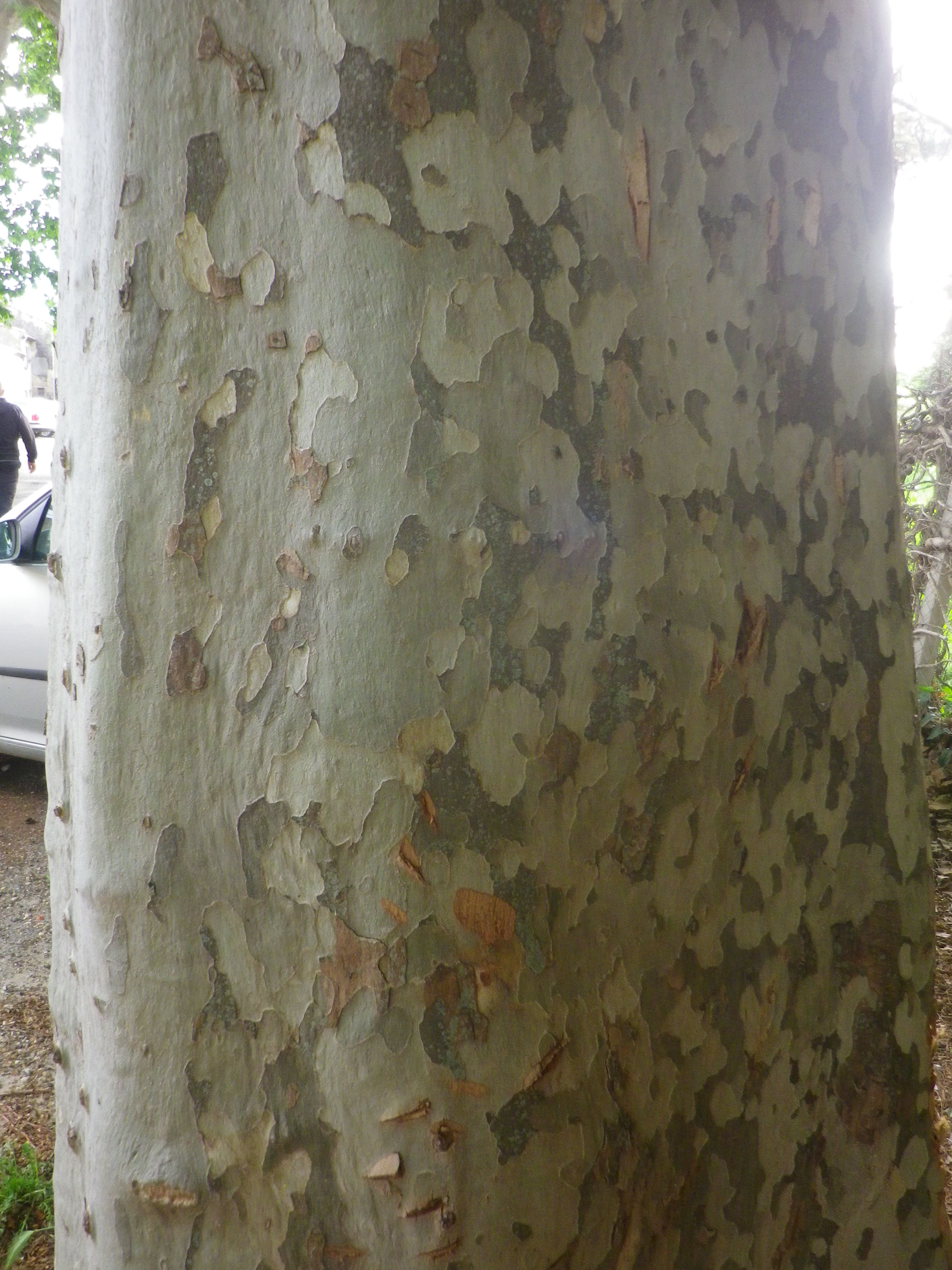 Ecorce platane